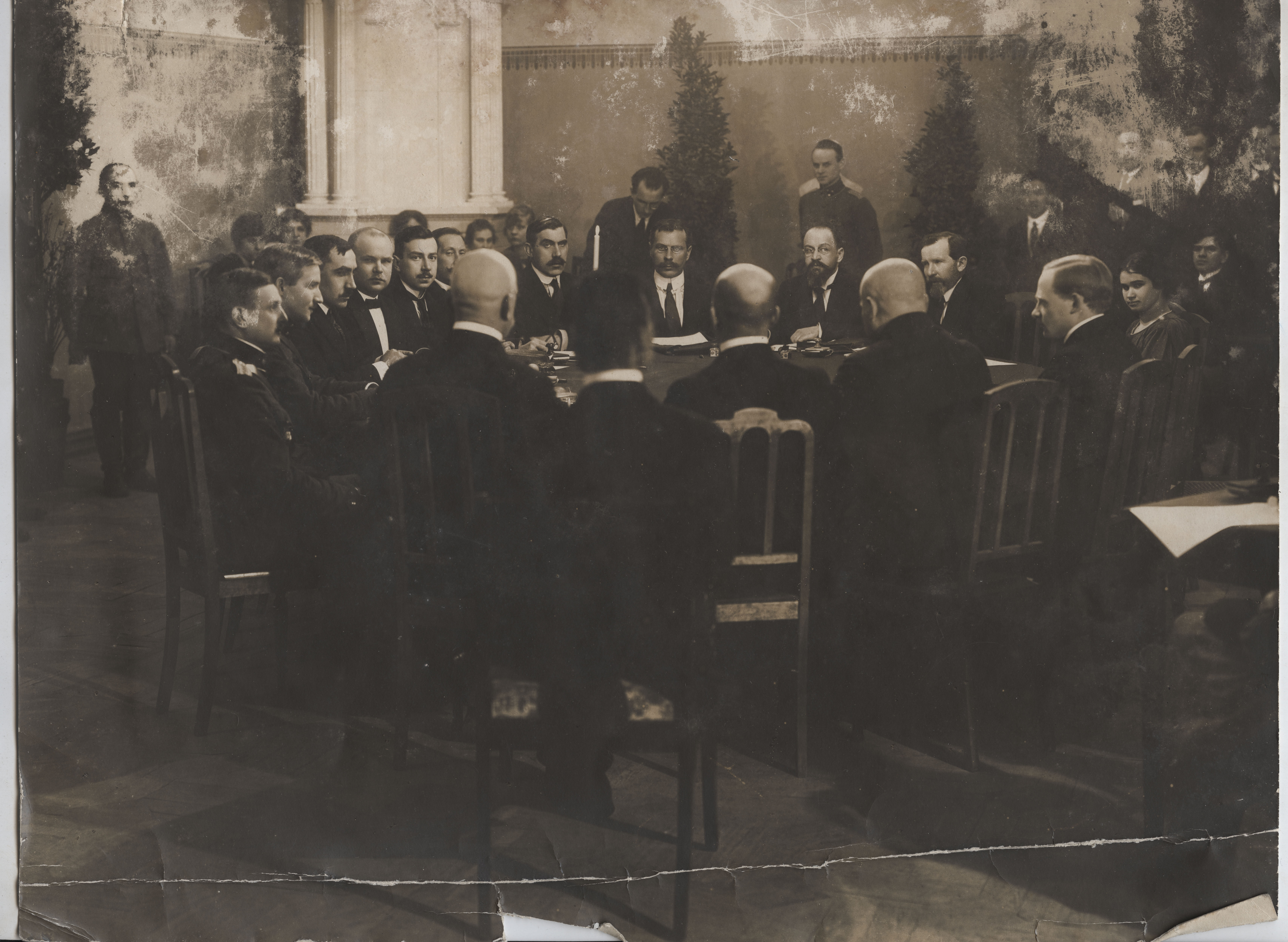 Tartu rahulepingu sõlmimine. Vene delegaadid ja eksperdid. Keskel püsiseisva Eesti ohvitseri ees vene delegatsiooni juht A. Joffe.